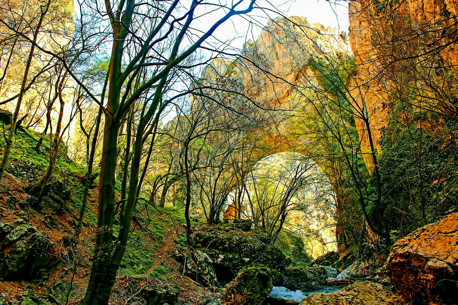 Споменик природе Прераст у кањону Вратне Ово је фотографија заштићеног природног добра у Србији под шифром: СП274 This is a a photo of a natural area in Serbia with ID: СП274